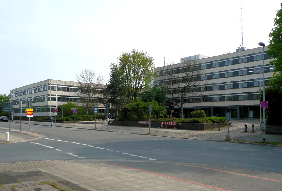 Gebäude der Bezirksregierung Hannover